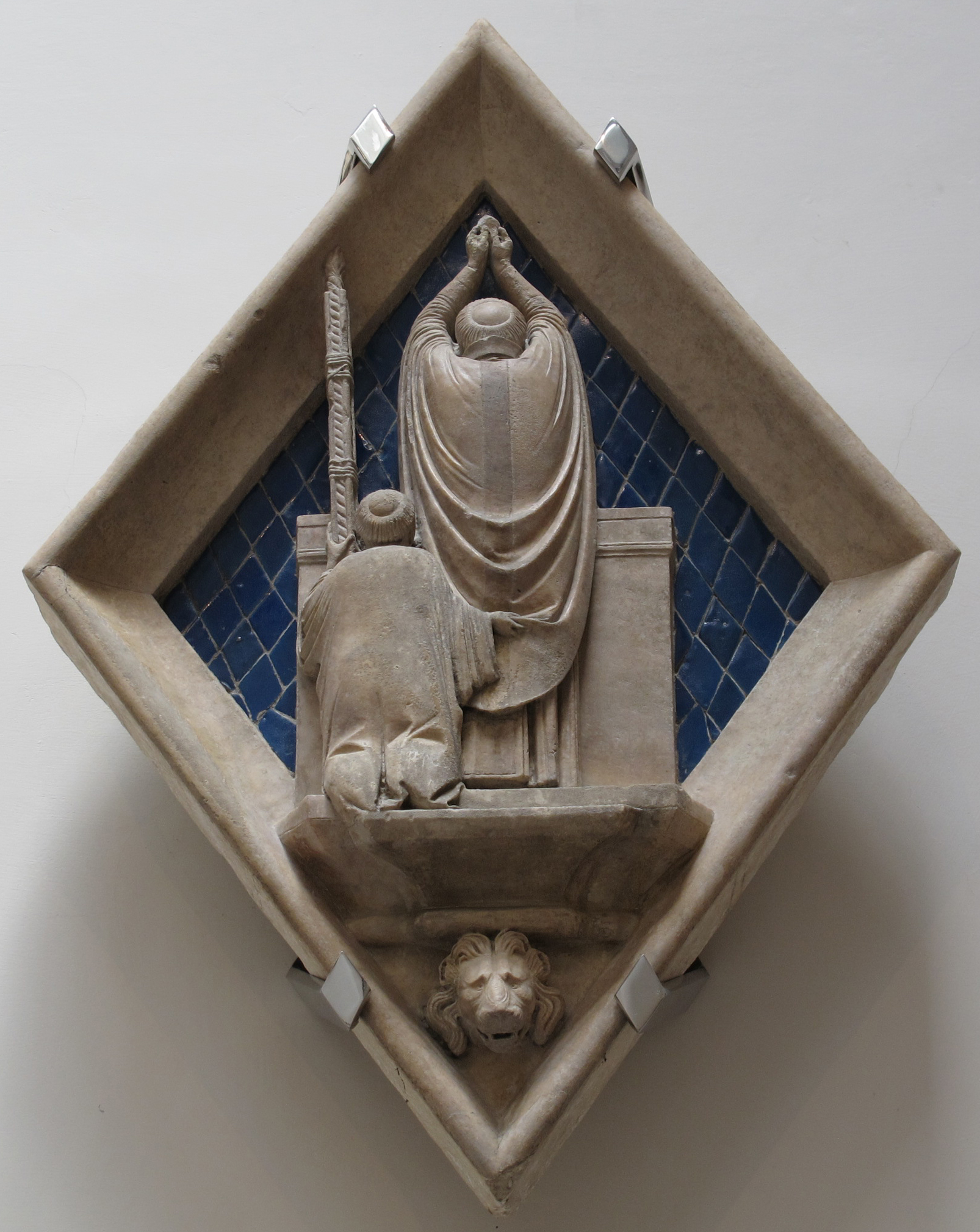 Maso di banco, eucarestia, 1337-41